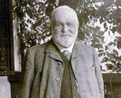 Eduard Porges von Portheim (1826 - 1907), Rakouský a český továrník a politik.